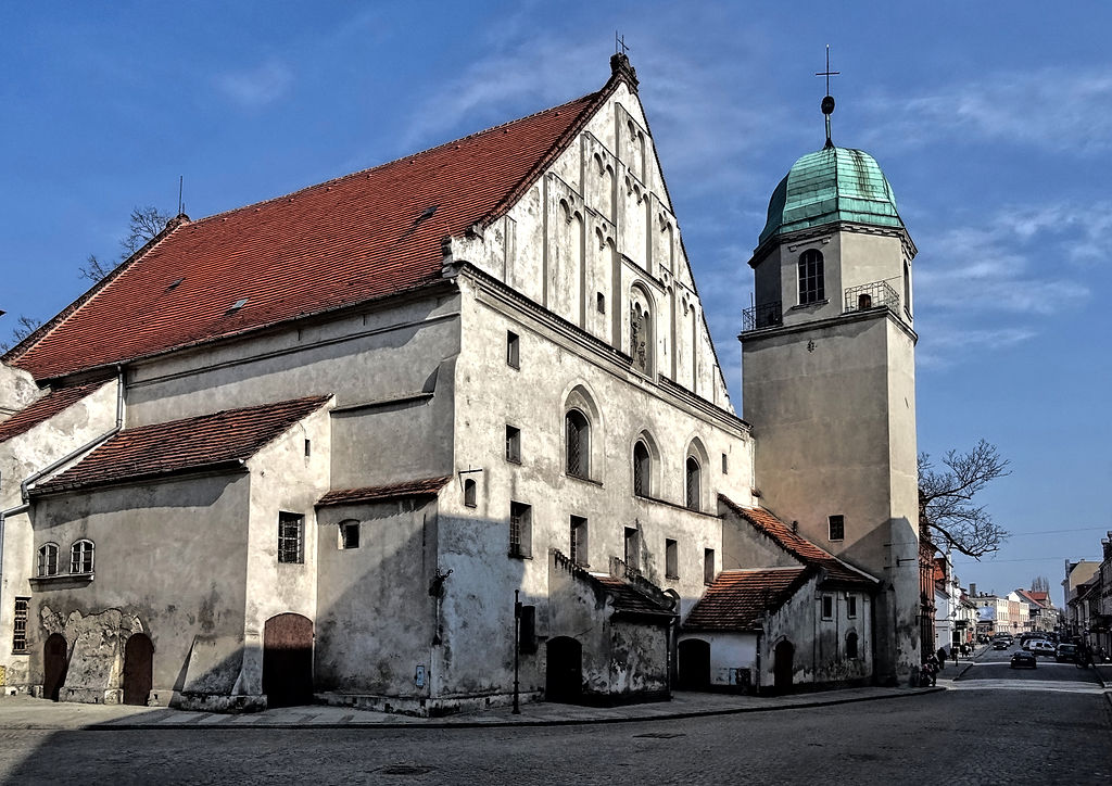 Wschowa, kościół ewangelicki p.w. Żłóbka Pana Jezusa, 1604, 1647, 1685, XVIII